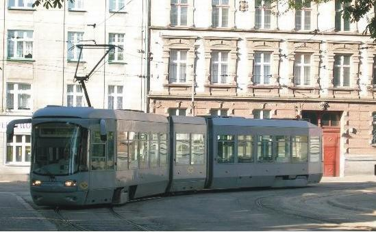 Tramwaj Konstal 116Nd Karlik na Placu Sikorskiego w Bytomiu.